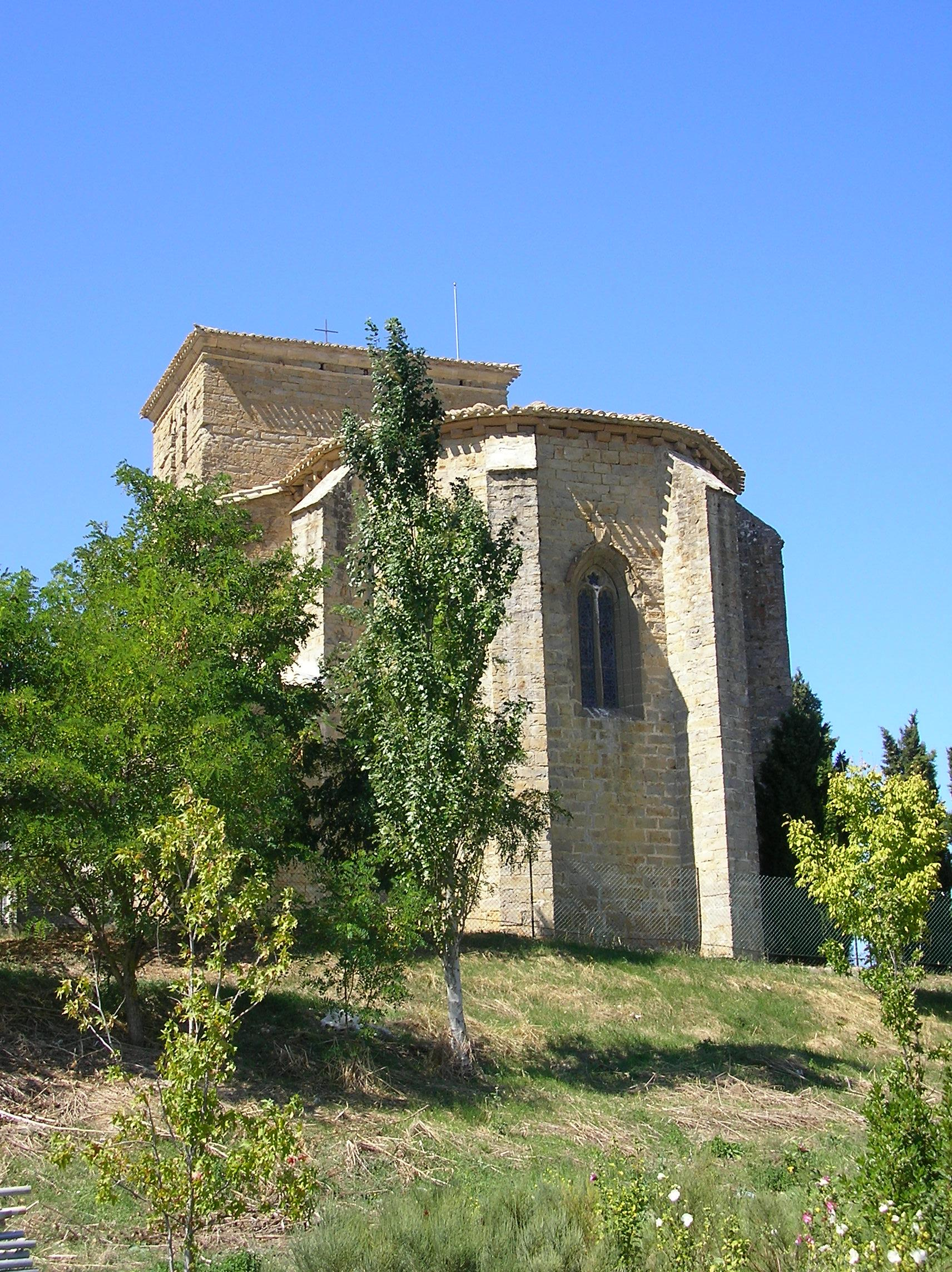 Iglesia de San Miguel, Noáin, Navarra, España / Church of Saint Michael, Noain, Navarre, Spain